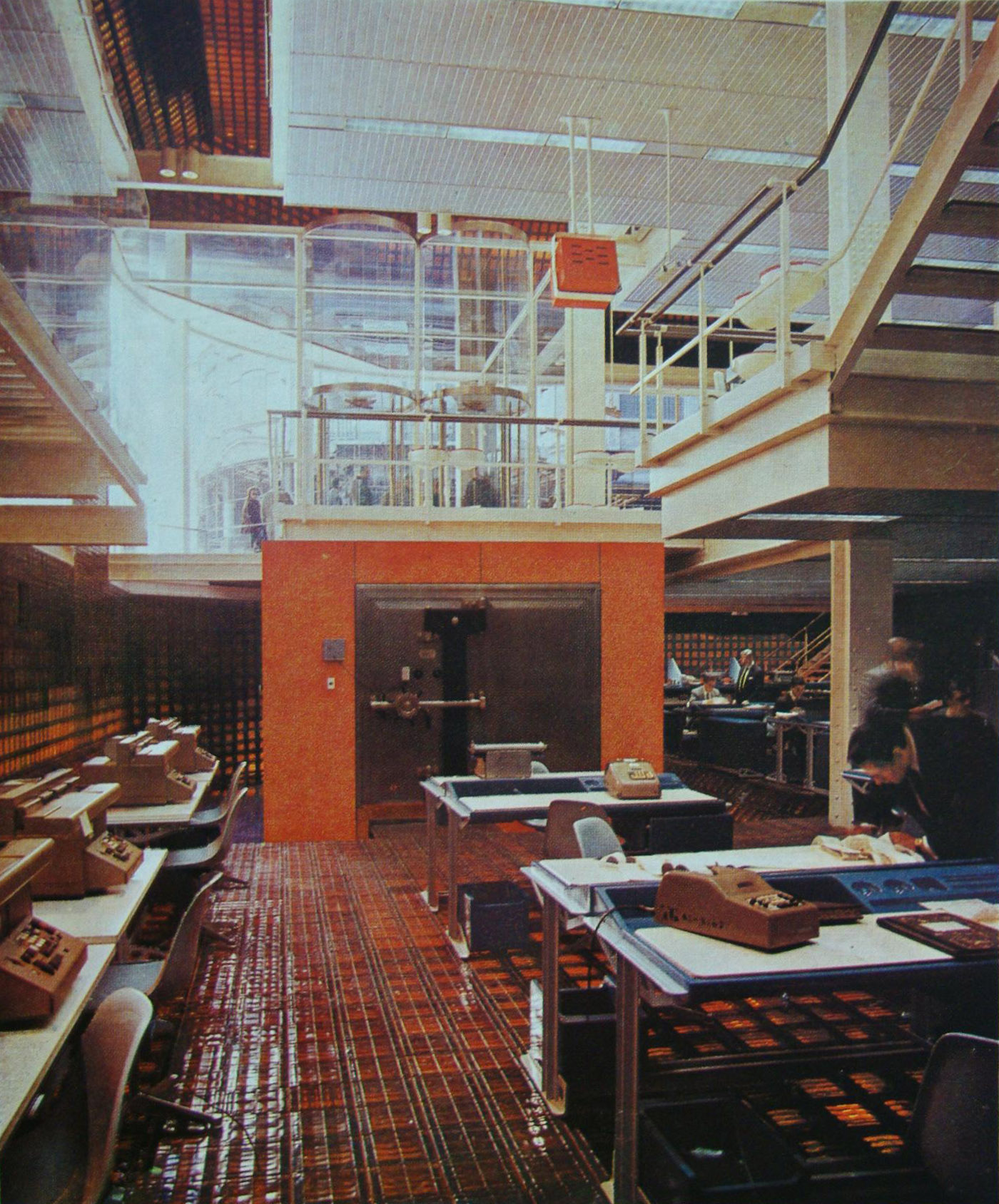 Ambiente en el interior de la casa matriz del Banco Municipal de la Ciudad de Buenos Aires (hoy Banco Ciudad de Buenos Aires). Obra de los arquitectos Manteola, Petchersky, Sánchez Gómez, Santos, Solsona y Viñoly. Calles Tte. Gral. Juan D. Perón y Florida.